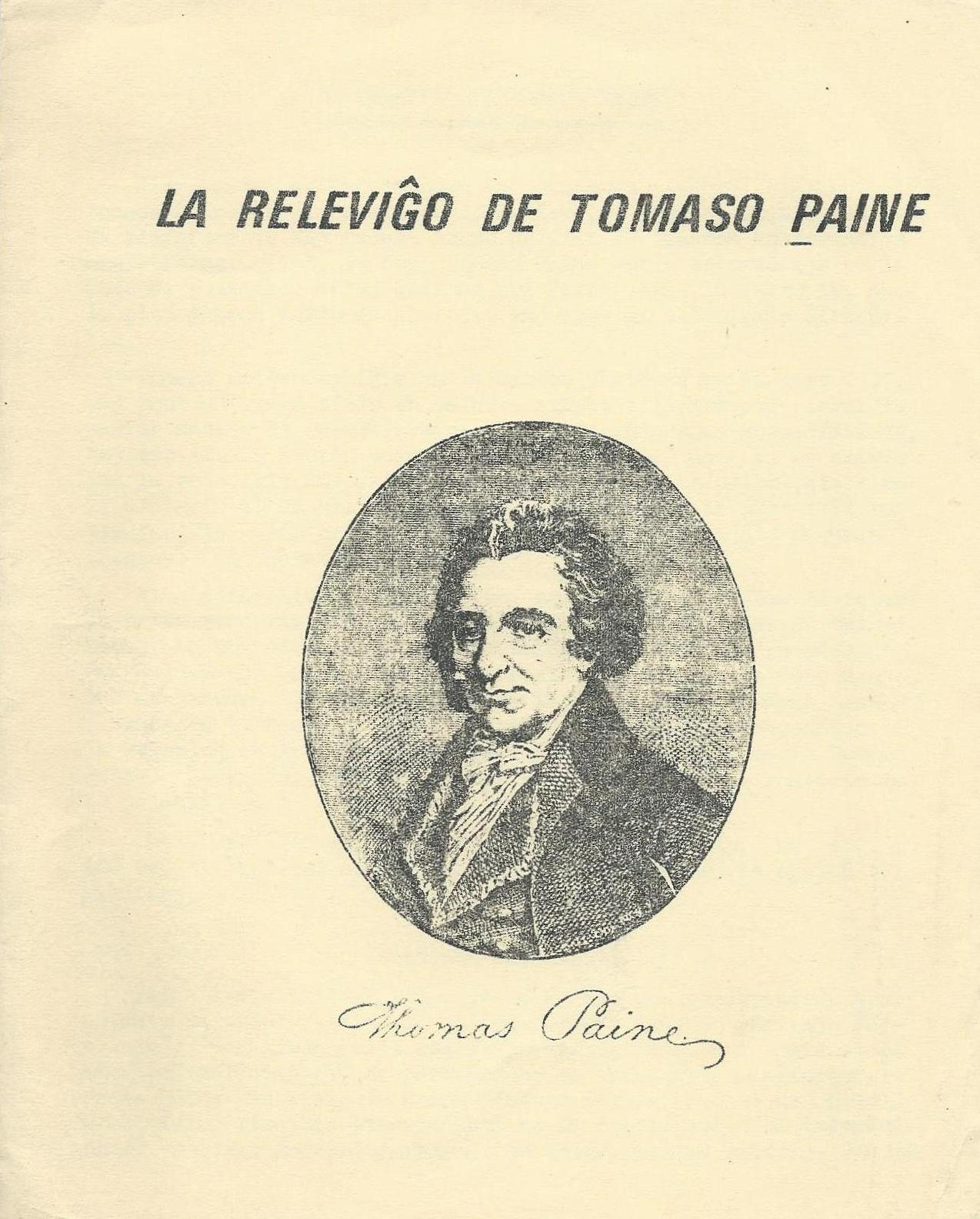 interna librokovrilo de "La Releviĝo de Tomaso Paine", 1972